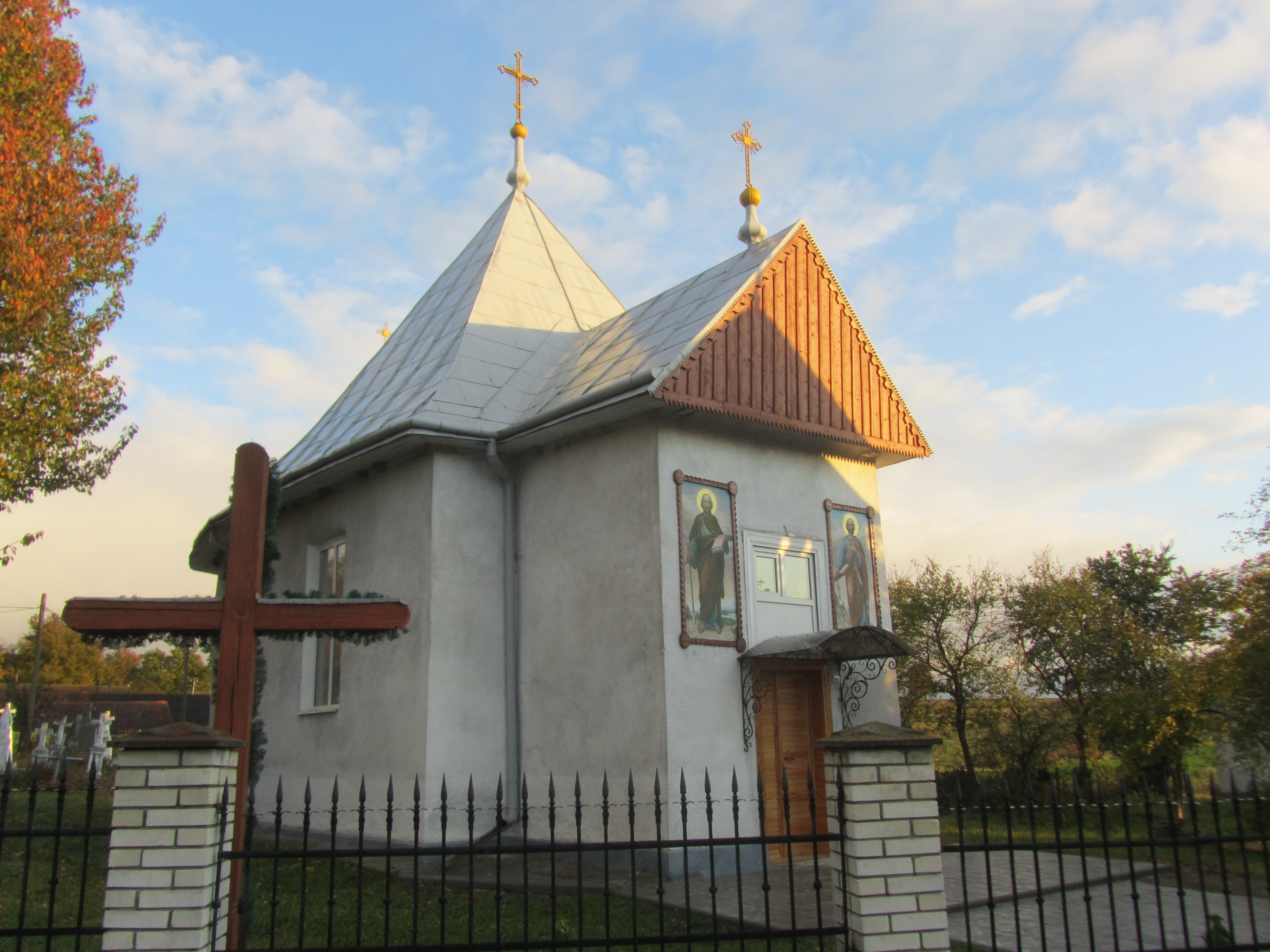 Перенівка Церква Св апостола Петра 1